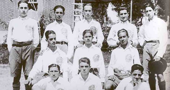 Centro Unión